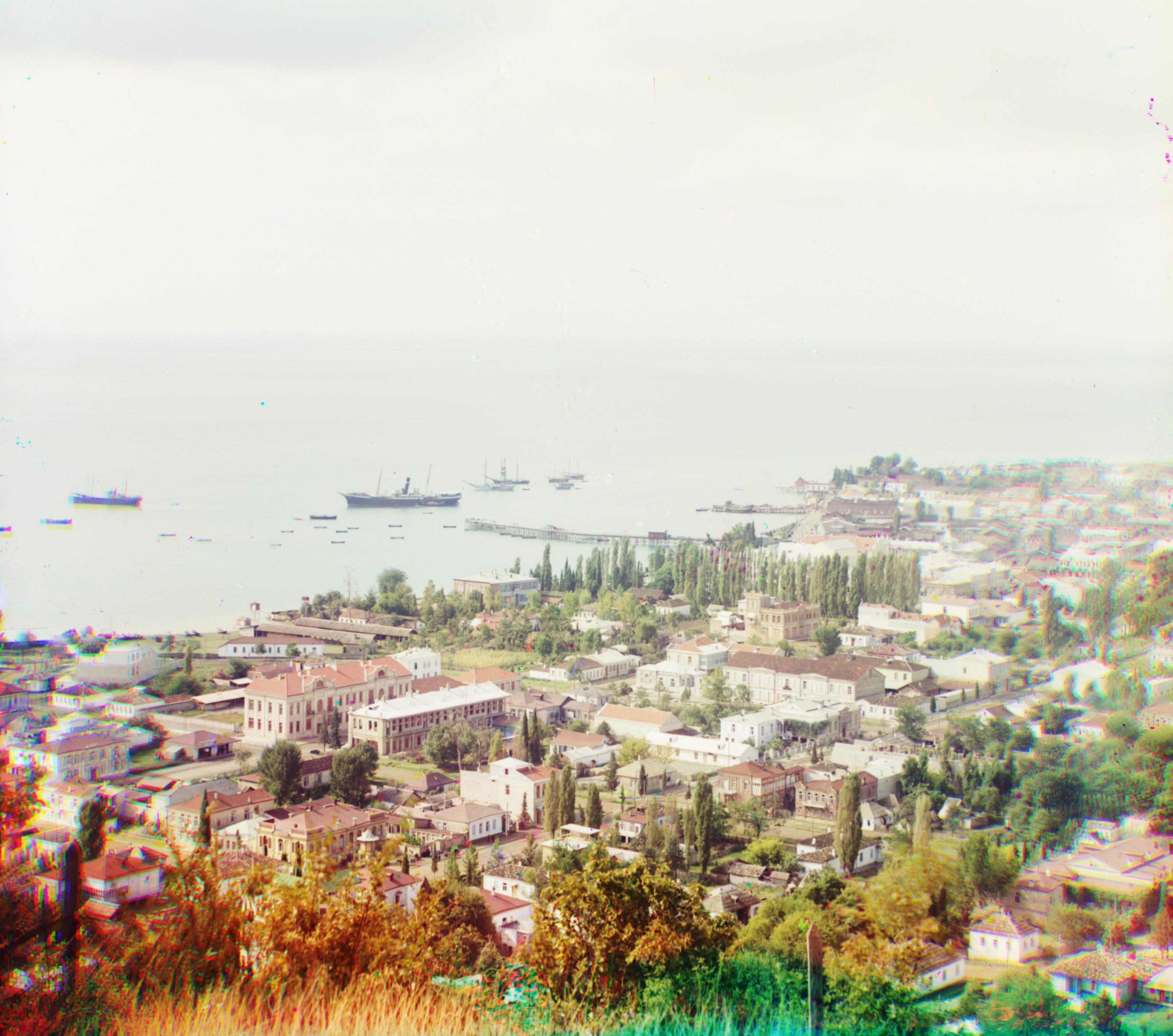 Prokudn-Gorskyis photograph of Suhumi, Abkhazia